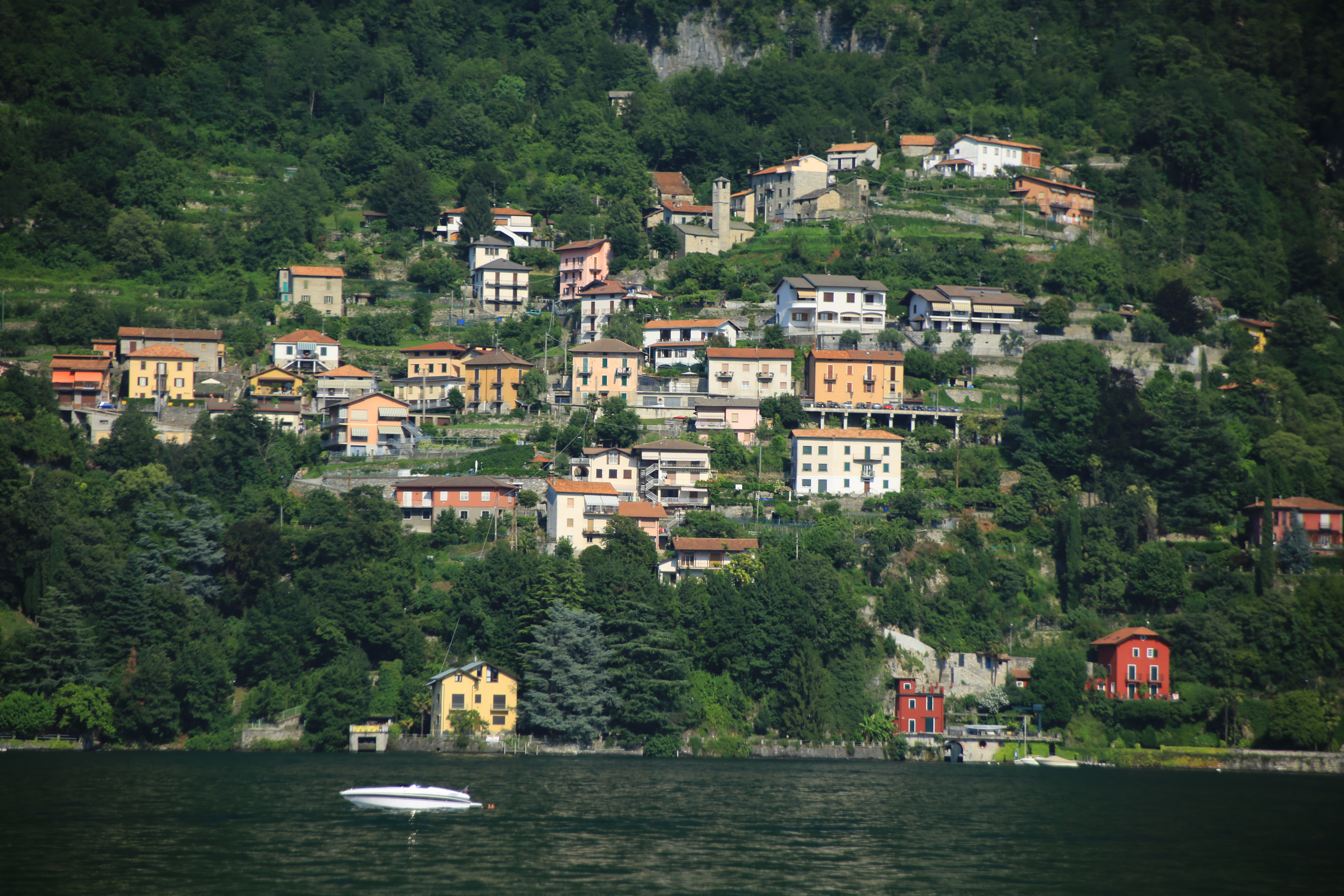 20170707_LakeComo_0174